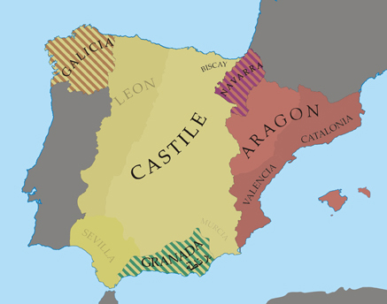 Mapa histórico que recolle os territorios e reinos en posesión de Fernando II de Aragón «o Católico» na Península Ibérica a partir do ano 1512. Destacan raiados os ultimos reinos sometidos ou anexionados polos Reis Católicos.